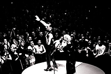 Livefoto im Konzert